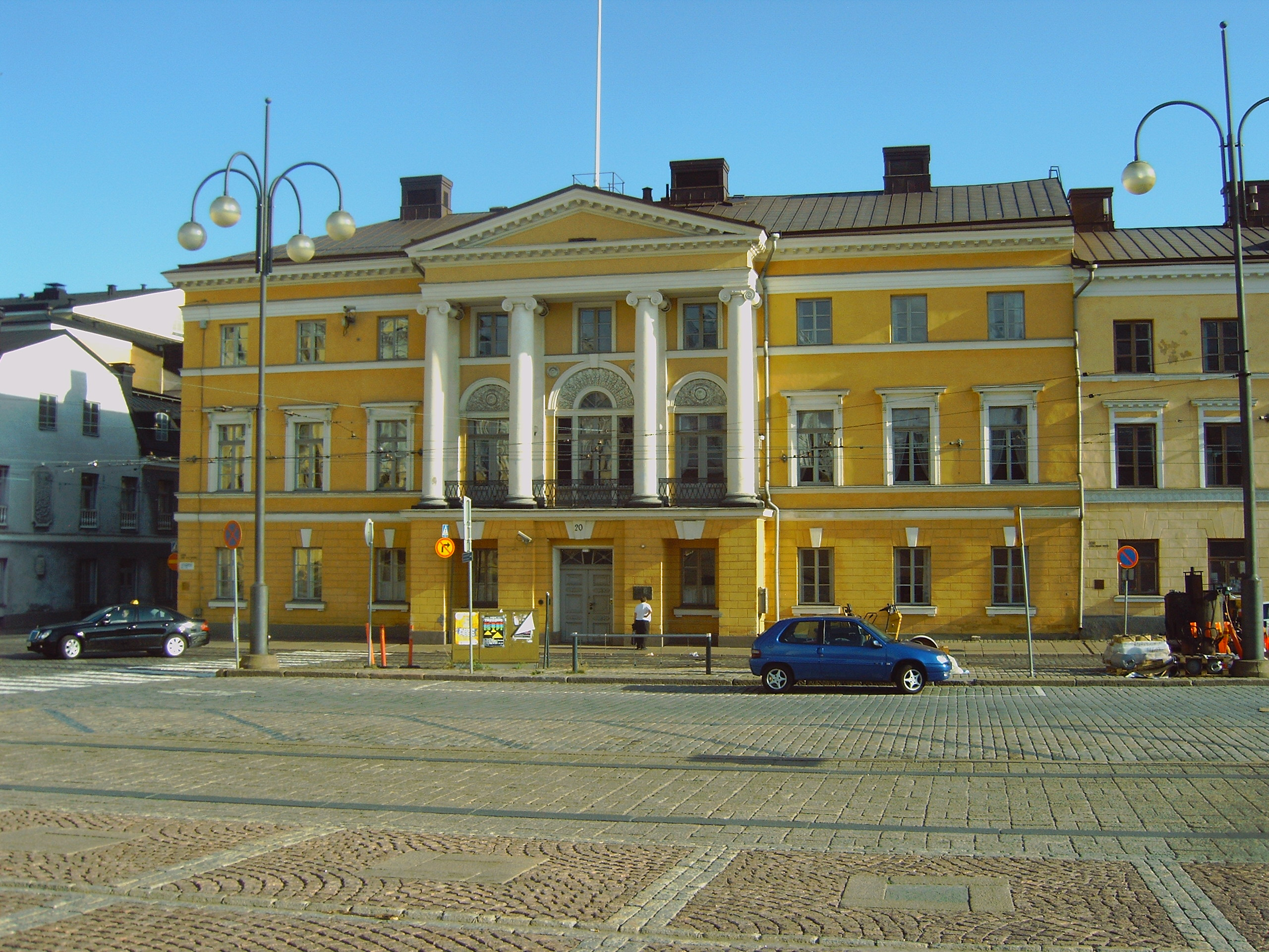 Bockin talo, Helsinki